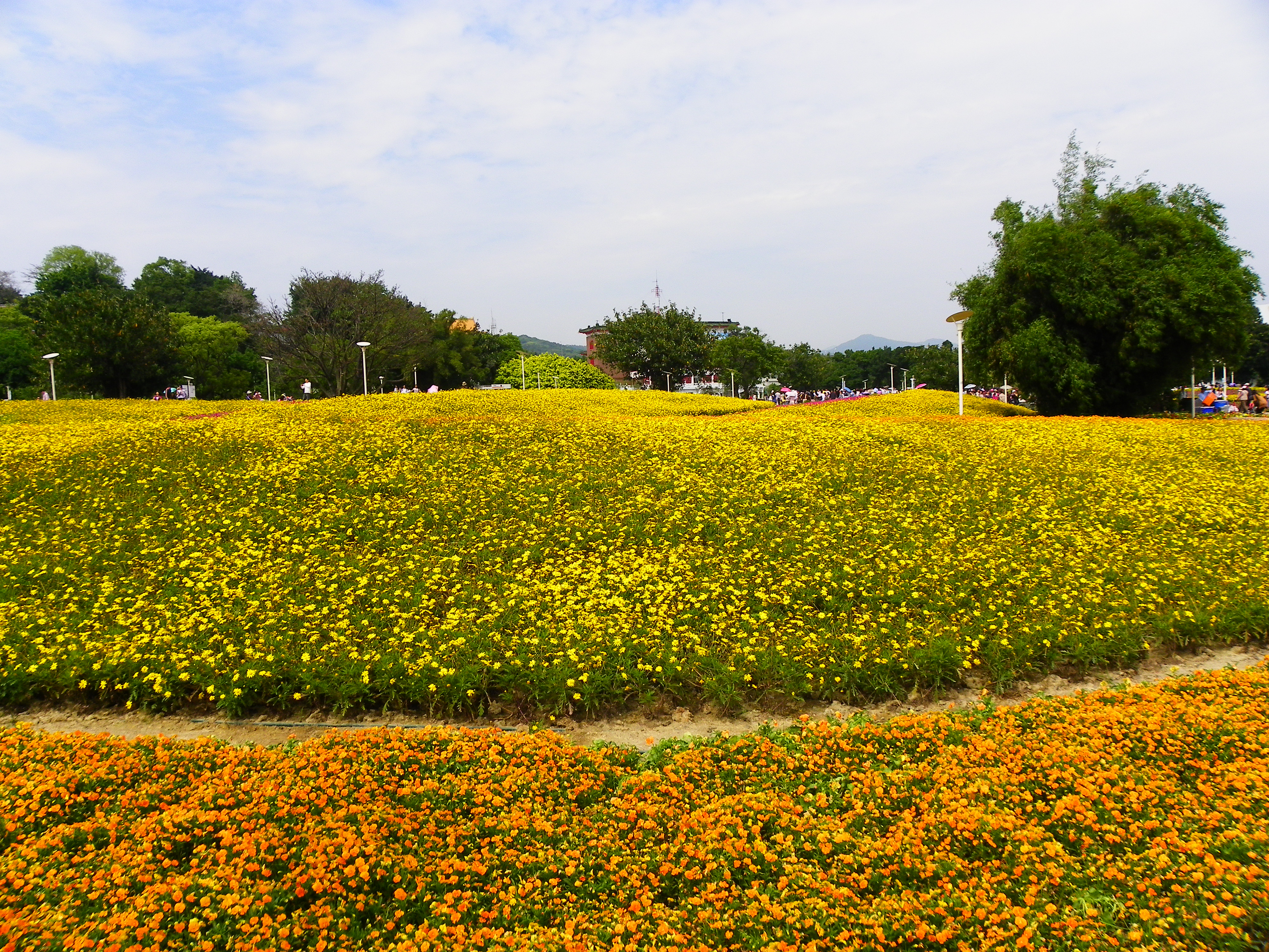 臺北國際花博圓山公園區的地景花海。